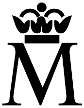 Фірмовий знак іспанського монетного двору